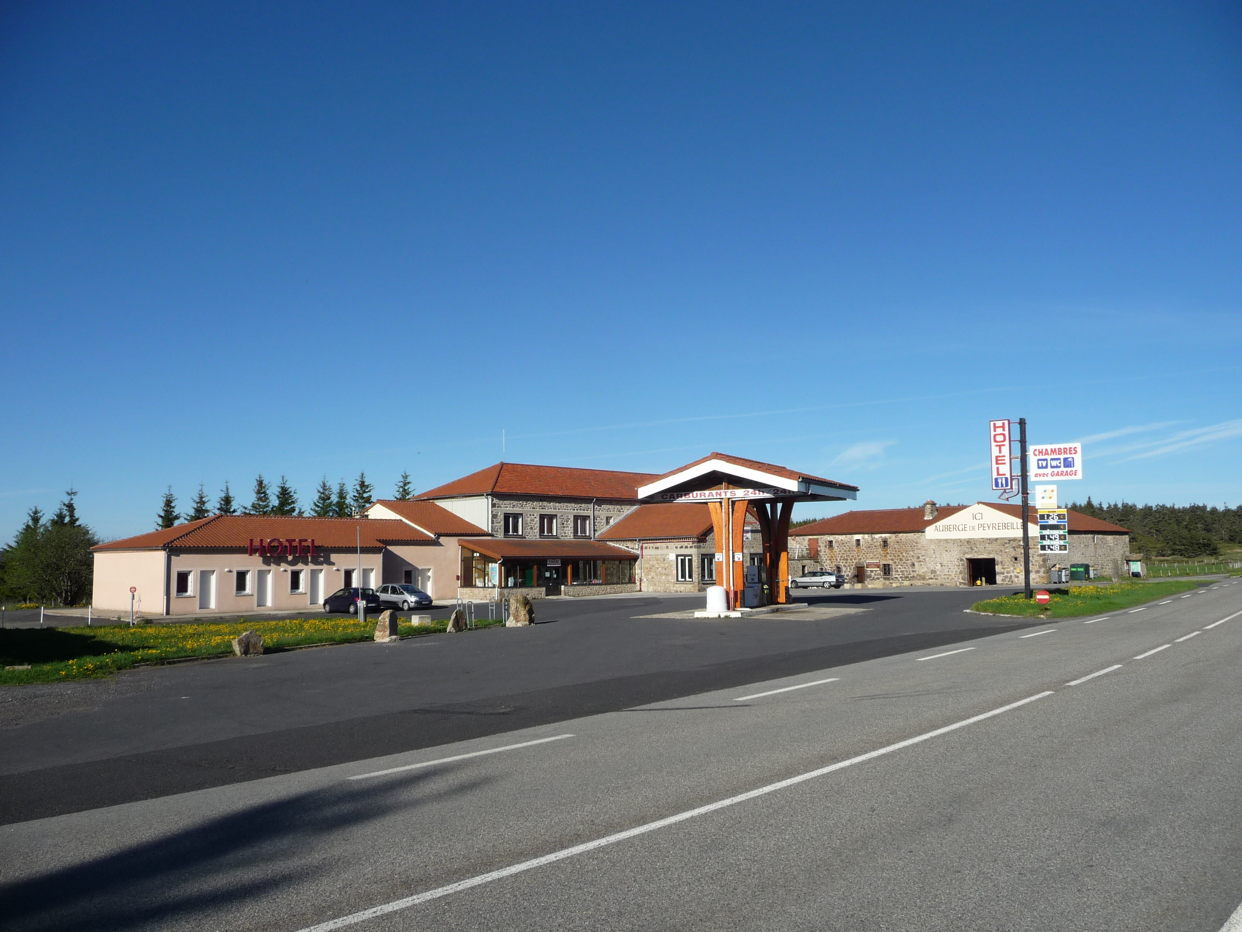 Komplettaufnahme der Auberge Rouge bzw. Auberge de Peyrebeille.